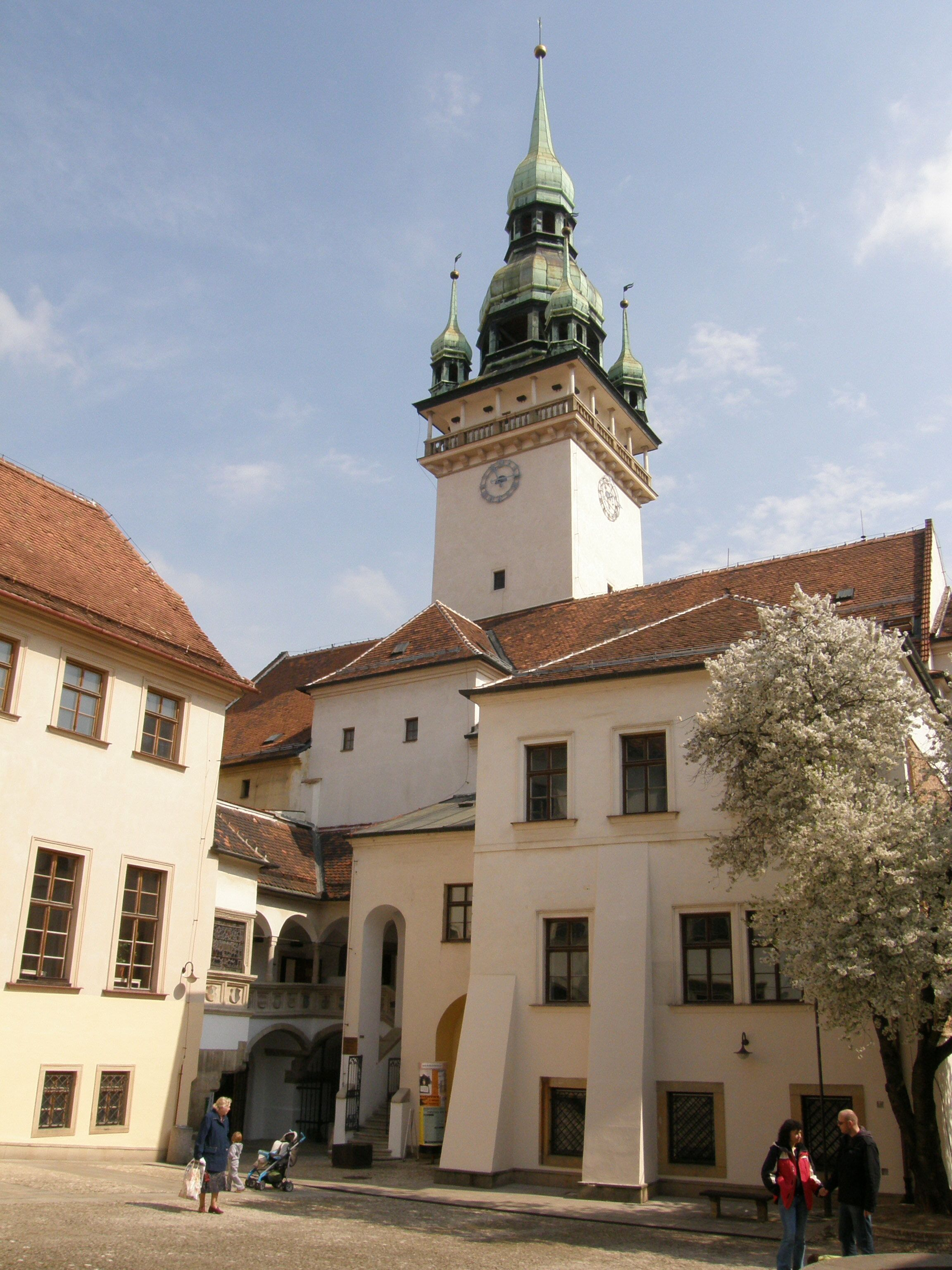 Stará radnice (Brno)